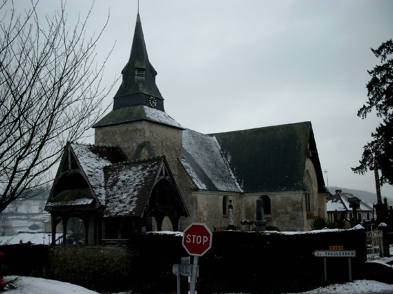 photo de l'église de Rocques sous la neige